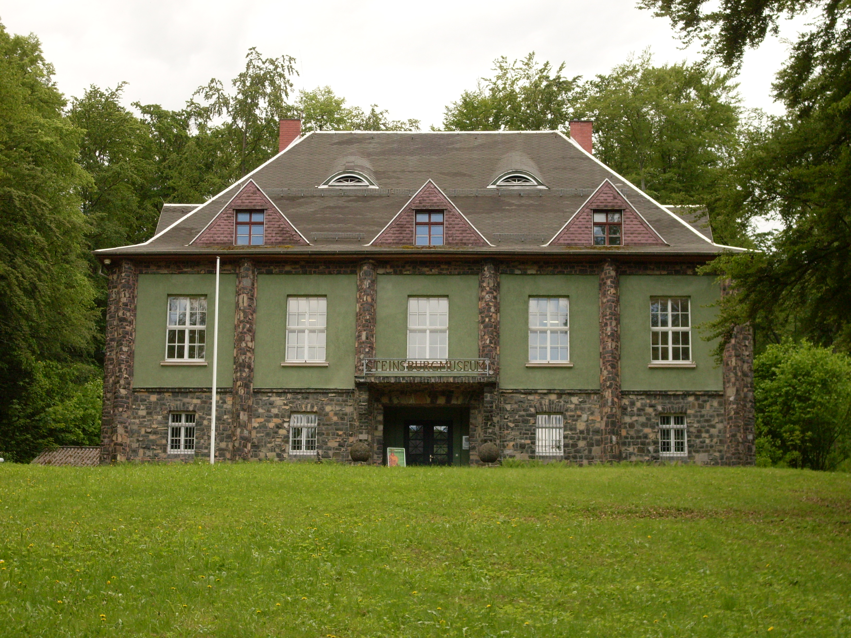 das Steinsburgmuseum bei Römhild